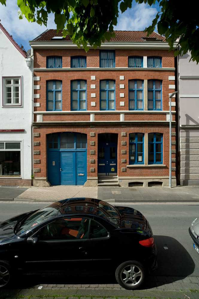 Frenkelhaus Lemgo